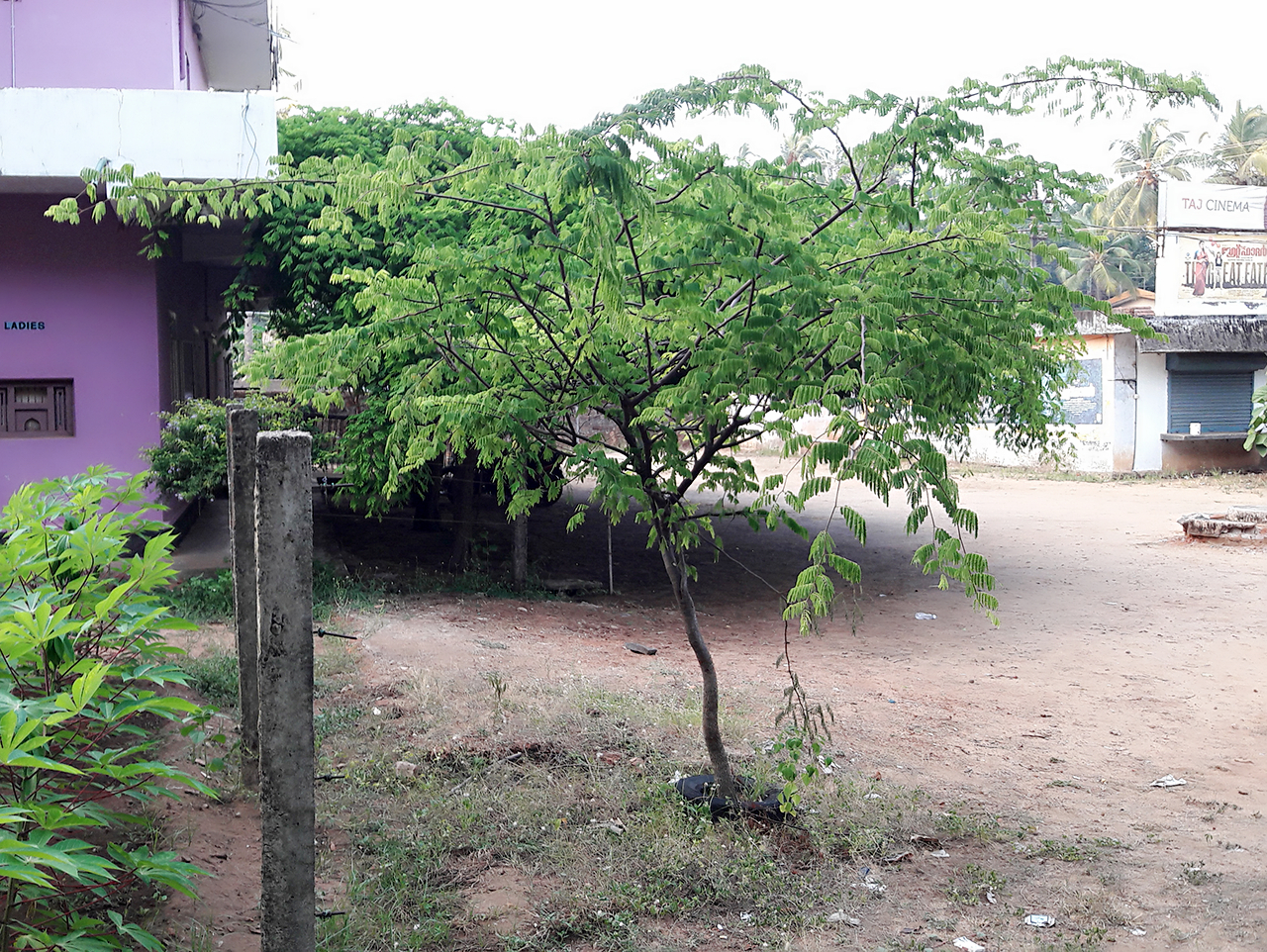 മലപ്പുറം ജില്ലയിലെ പൊന്നാനി താലൂക്കില്‍ പാലപ്പെട്ടി താജ് ടാക്കീസില്‍ തണല്‍ ഒരുക്കുന്ന ഡിവി ഡിവി മരങ്ങള്‍.